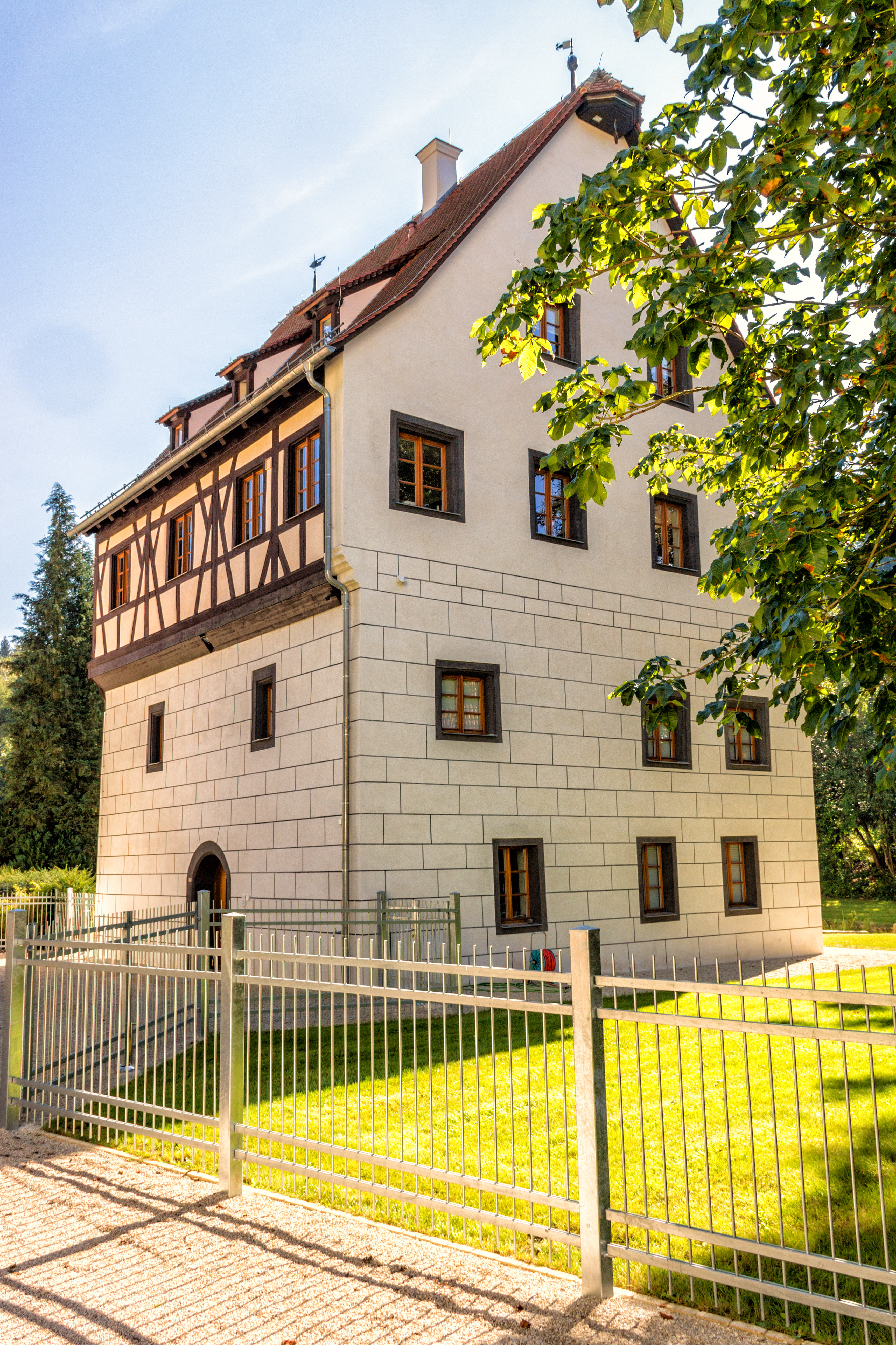 Ehemaliges Schloss, dreigeschossiger Satteldachbau, Erdgeschoss und 1. Obergeschoss, um 1450 (dendrochronologische Datierung), Decken und Fachwerkaufbau 2. Obergeschoss, um 1555 (dendrochronologische Datierung), barocke Überformungen, 18. Jahrhundert, HirschbachThis is a photograph of an architectural monument.